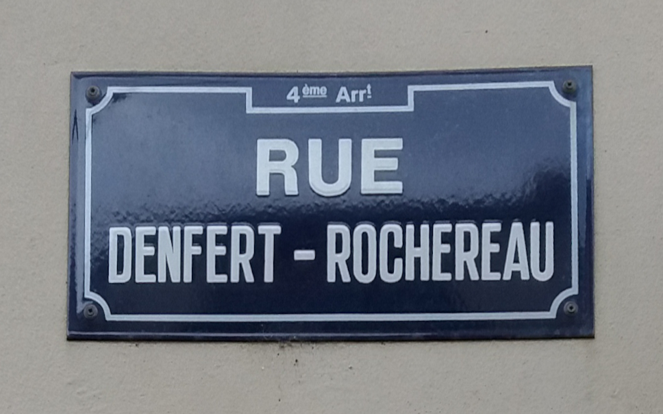 Plaque.